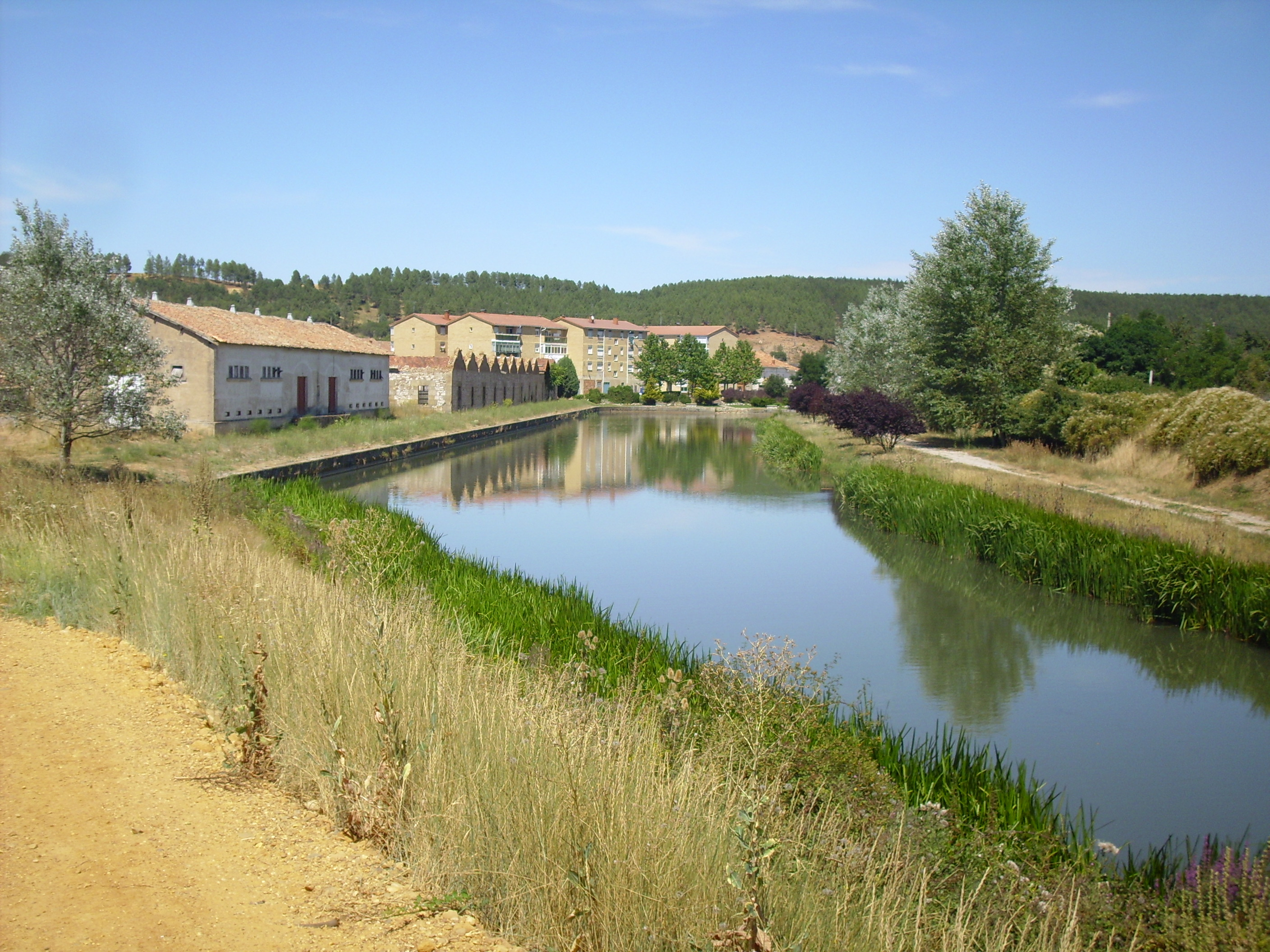 Darsena del Canal de Castilla a su paso por Alar del Rey (Palencia) Vista desde el sur.